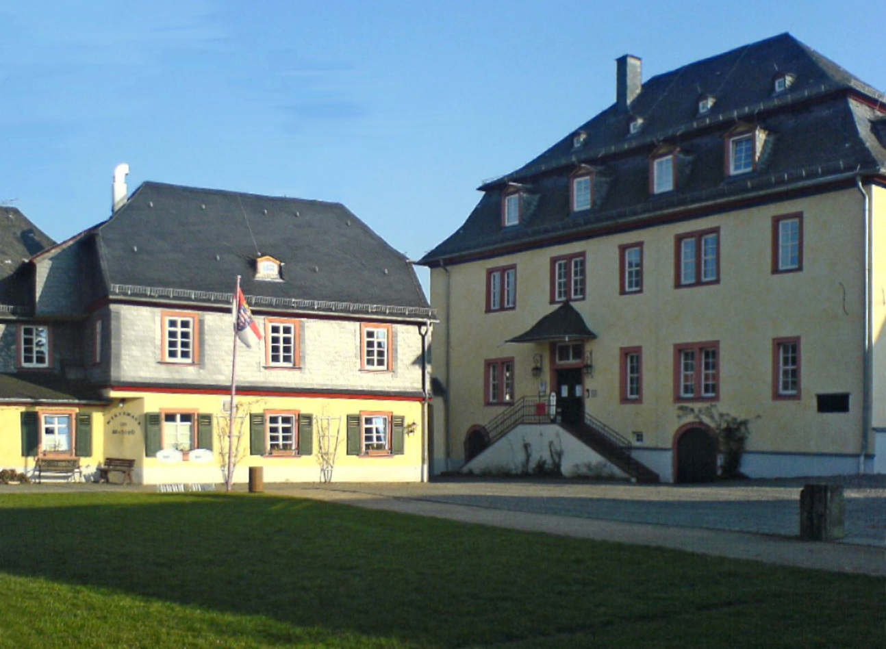 Schloss in Taunusstein-Wehen, Germany